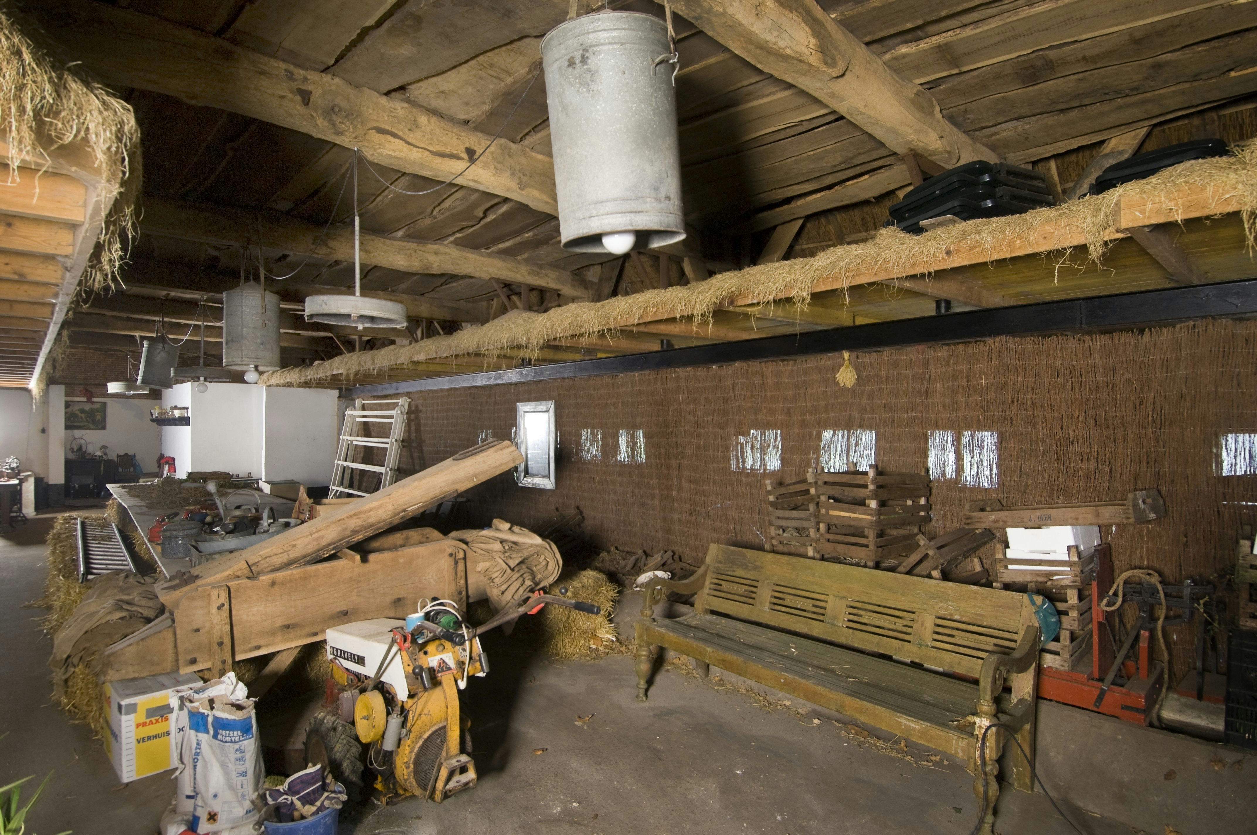 Boerderijcomplex: Interieur, overzicht van de deel